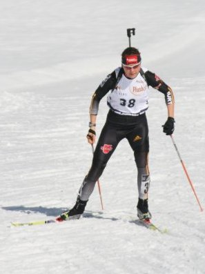 See Title